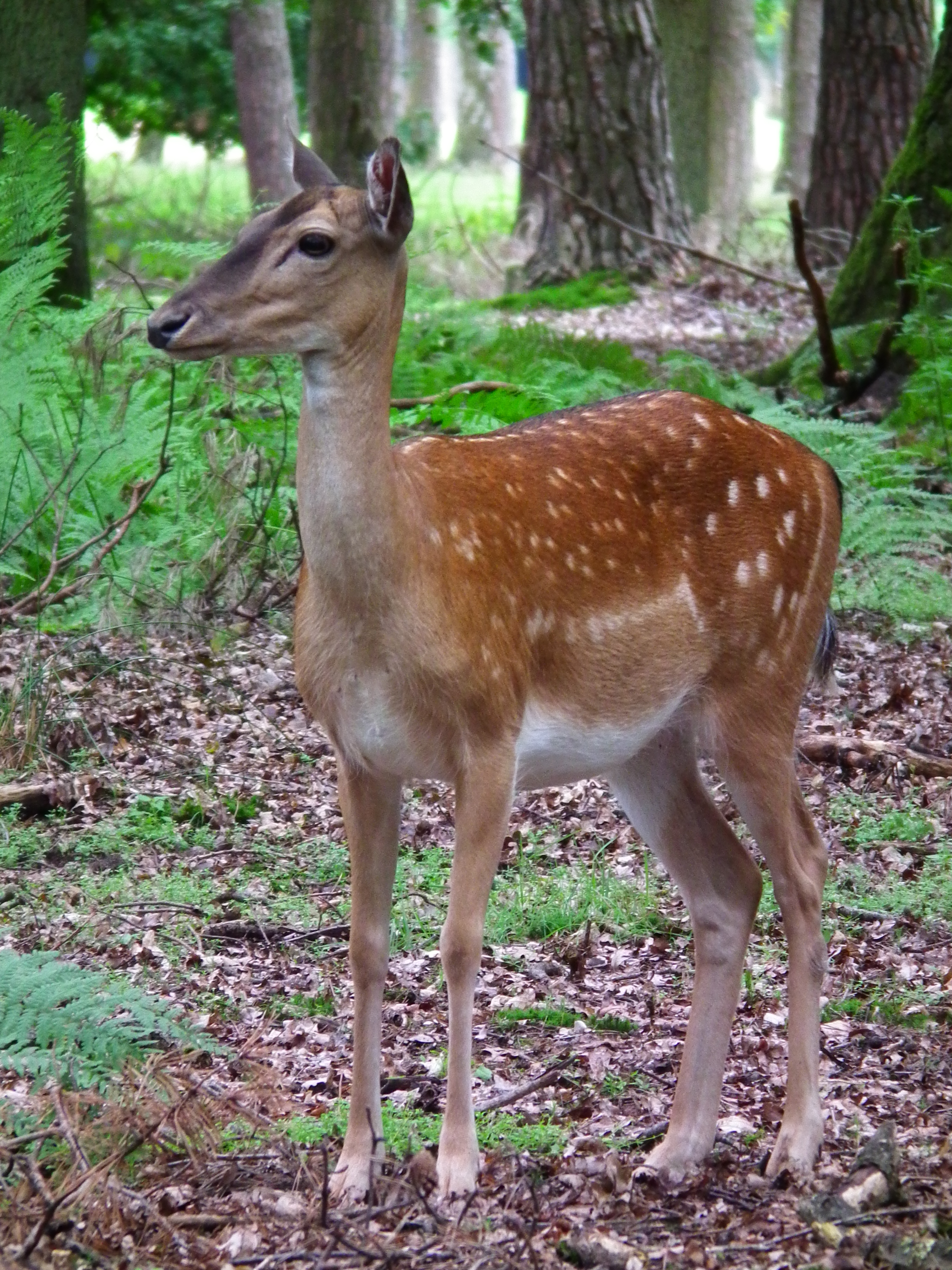 Damhirsch (Dama dama), aufgenommen im Wildpark Alte Fasanerie in Klein-Auheim (Hessen, Deutschland)